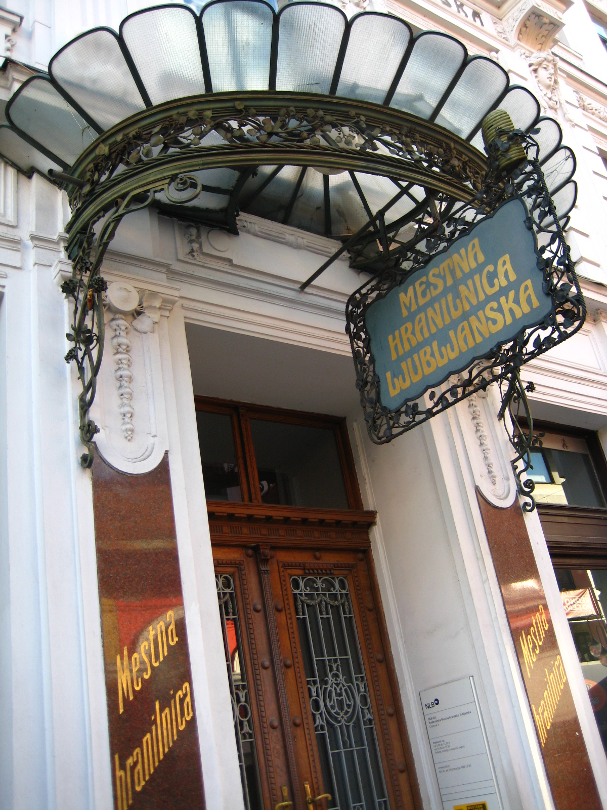 Mestna hranilnica ljubljanska, Čopova 3 (Josip Vancaš, 1903 - 1904)